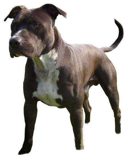 Staffordshire terrier américain sur fond blanc